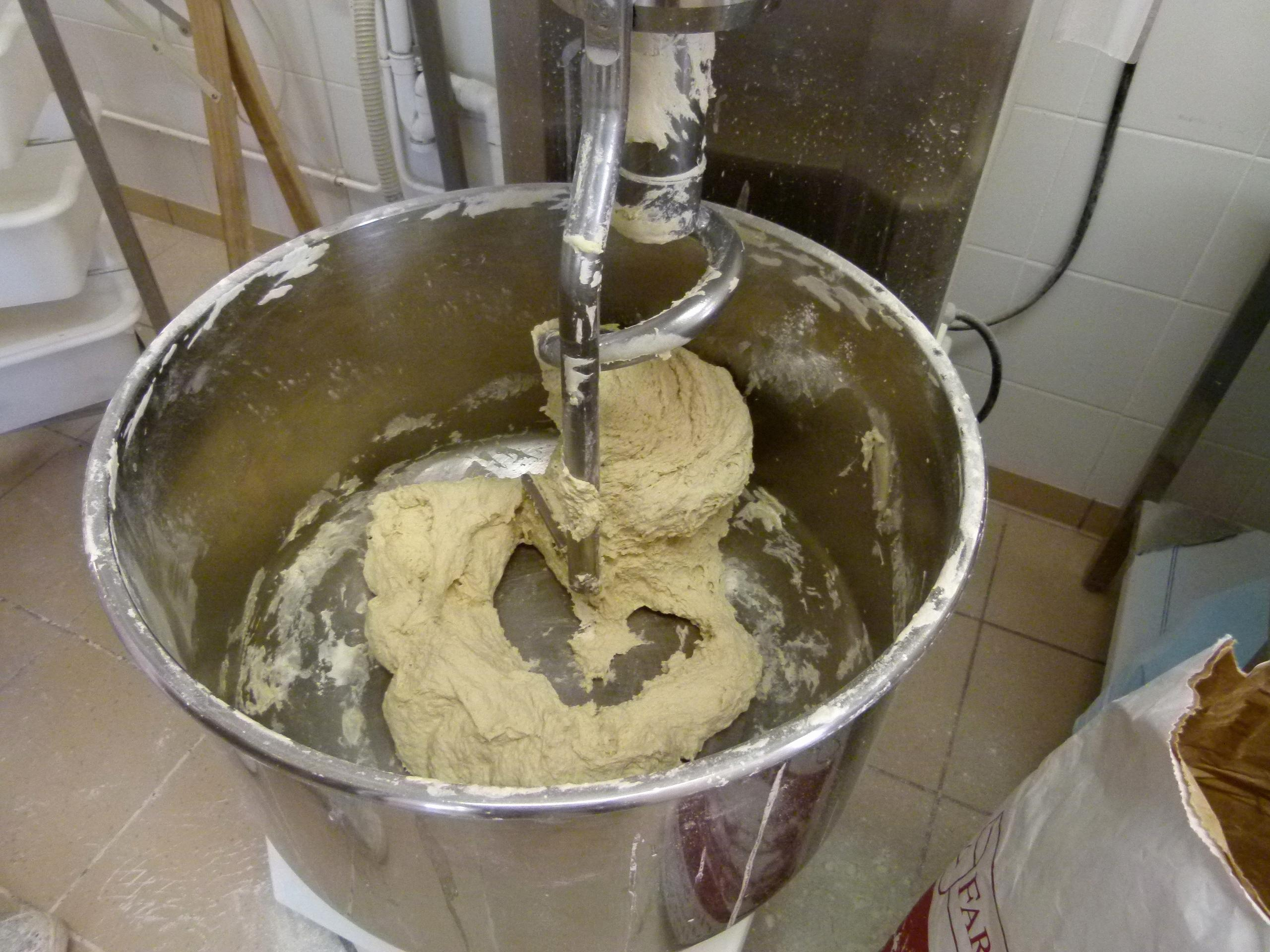 Pétrin à spirale, capot relevé. Boulangerie La Belle Marianne Boutiers-St-Trojan France